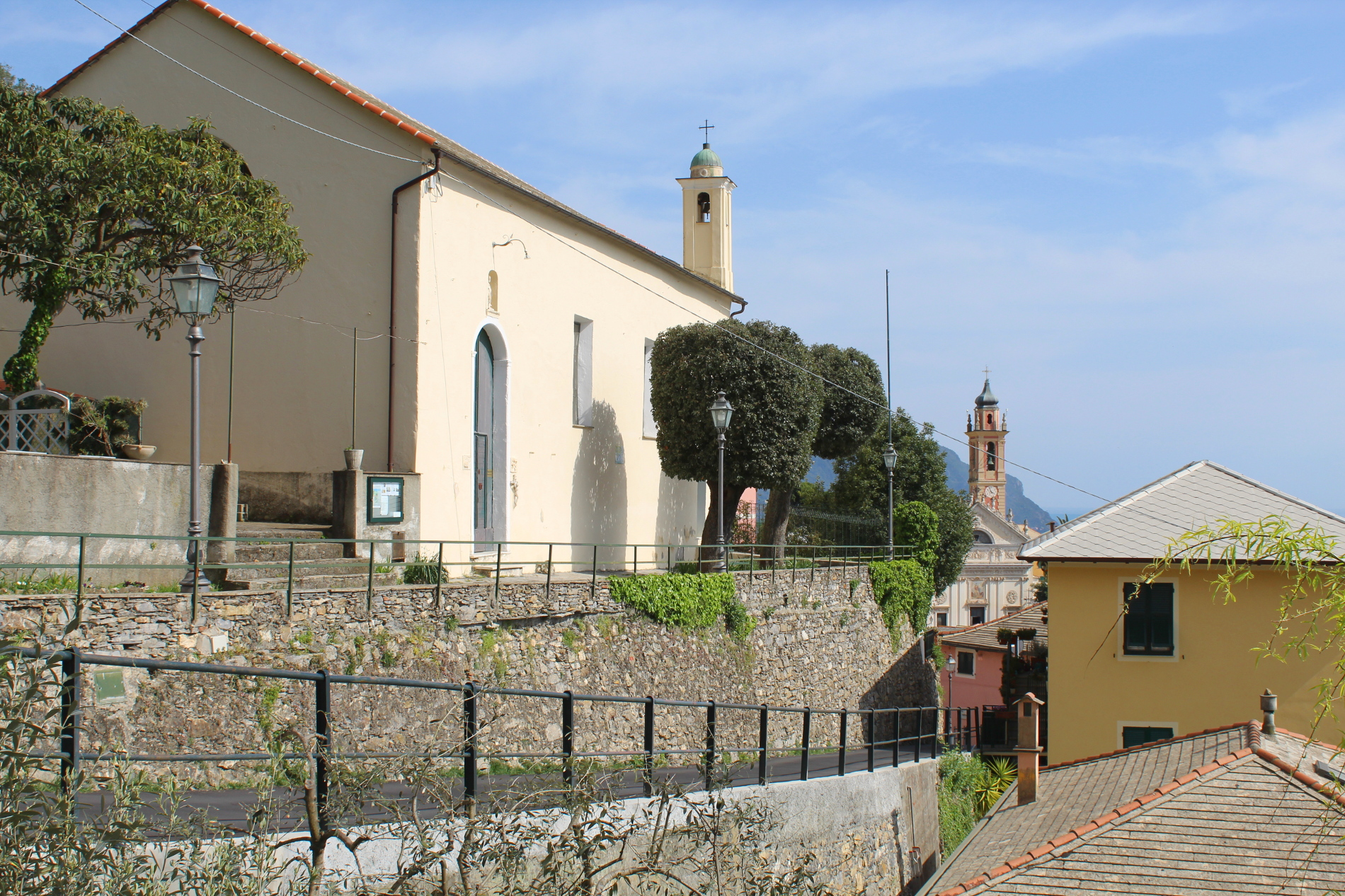 L' Oratorio di Sant'Antonio abate a Pieve Ligure